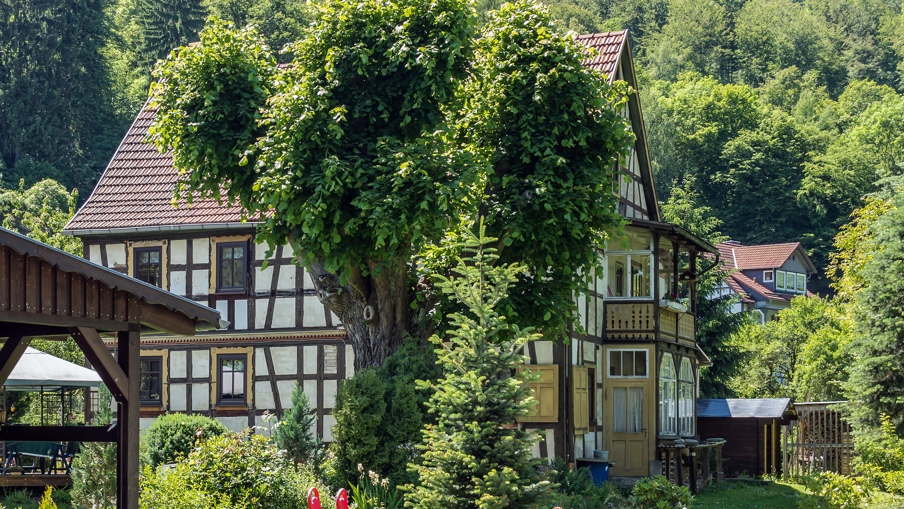 Denkmalgeschütztes Wohnhaus Schwarzburg Brückengasse 4